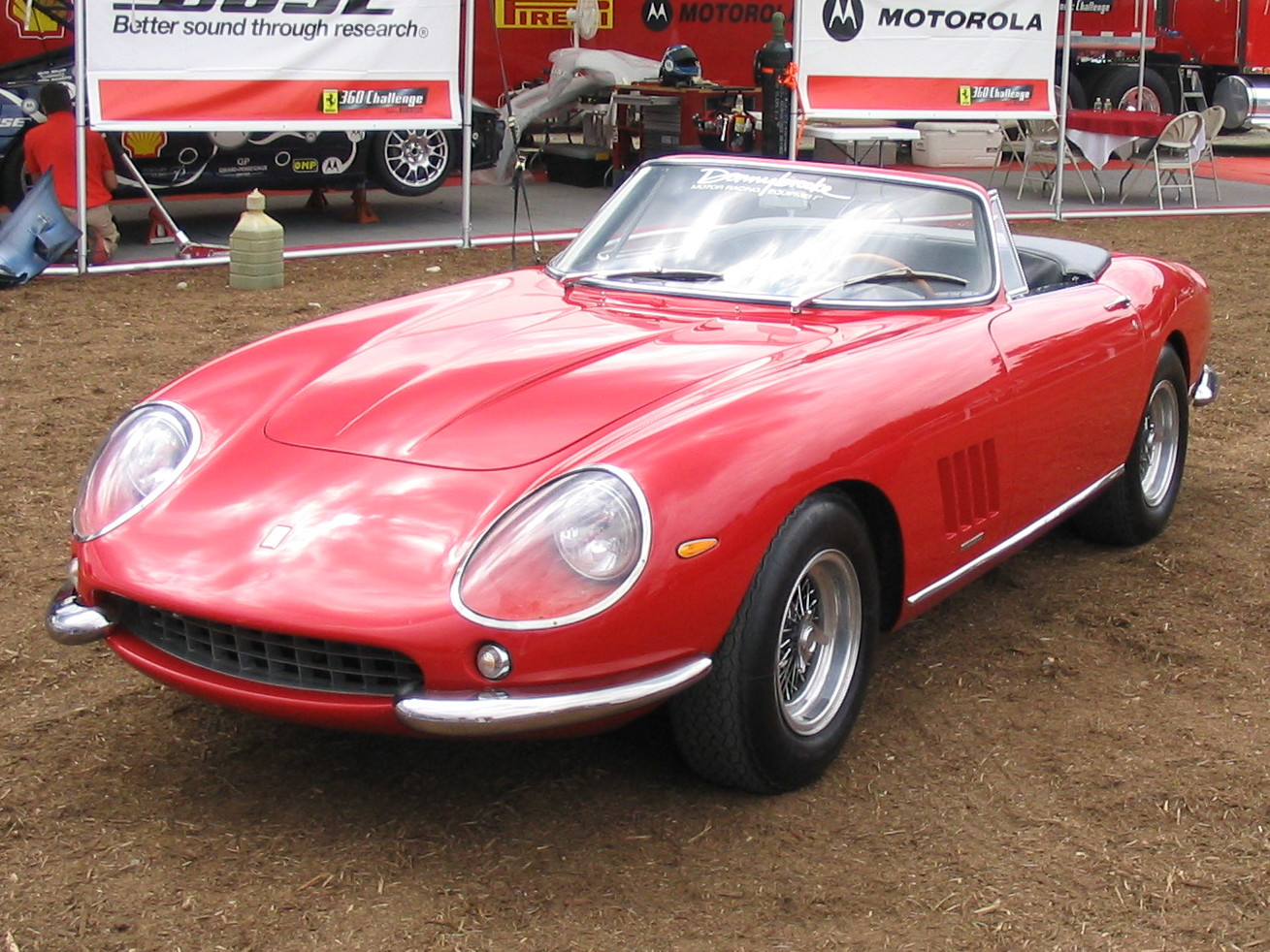 1967 Ferrari 275 GTB/4 NART Spyder